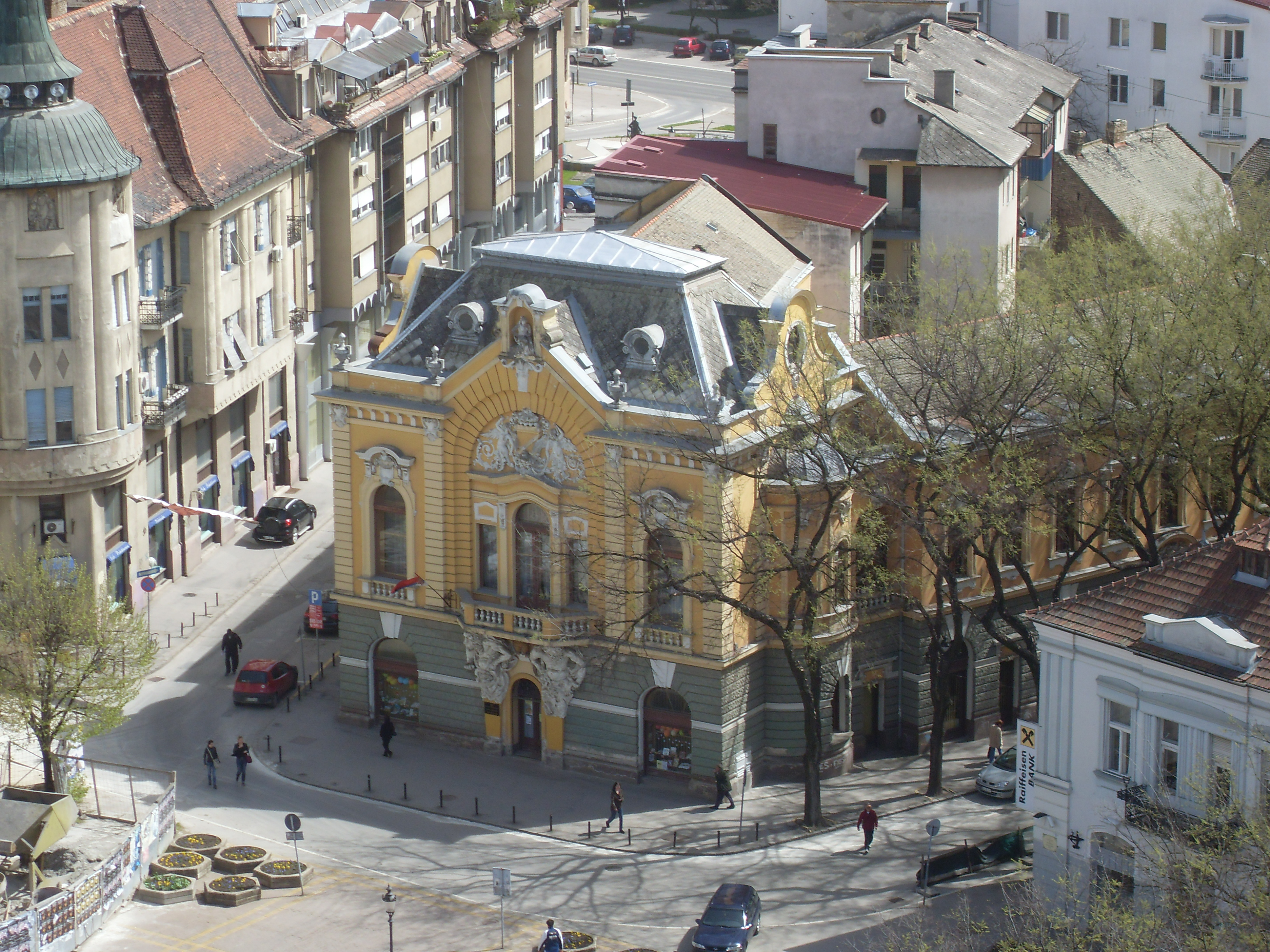 Зграда Градске библиотеке у Суботици